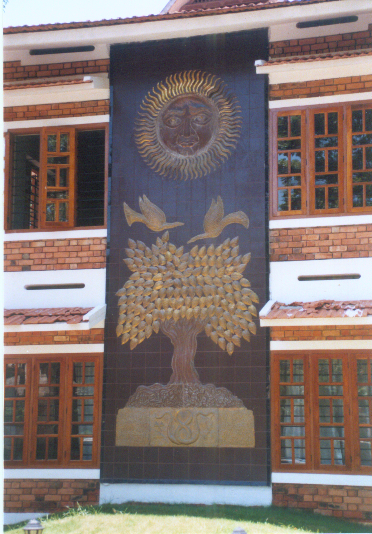 ജയപാലപ്പണിക്കരുടെ മെറ്റൽ റിലീഫ്